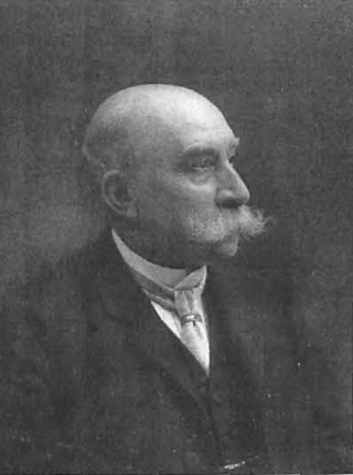 D. José Masriera, notable pintor fallecido en esta ciudad el día 31 de enero último, fotografía de Audouard.